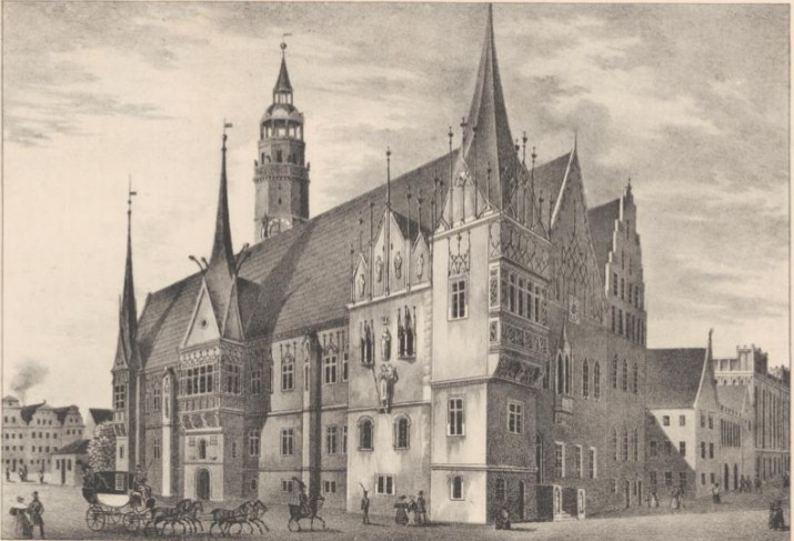 Das Rathaus zu Breslau, Lithographie : 19 x 13 cm, Heinrich Wilhelm Teichgräber